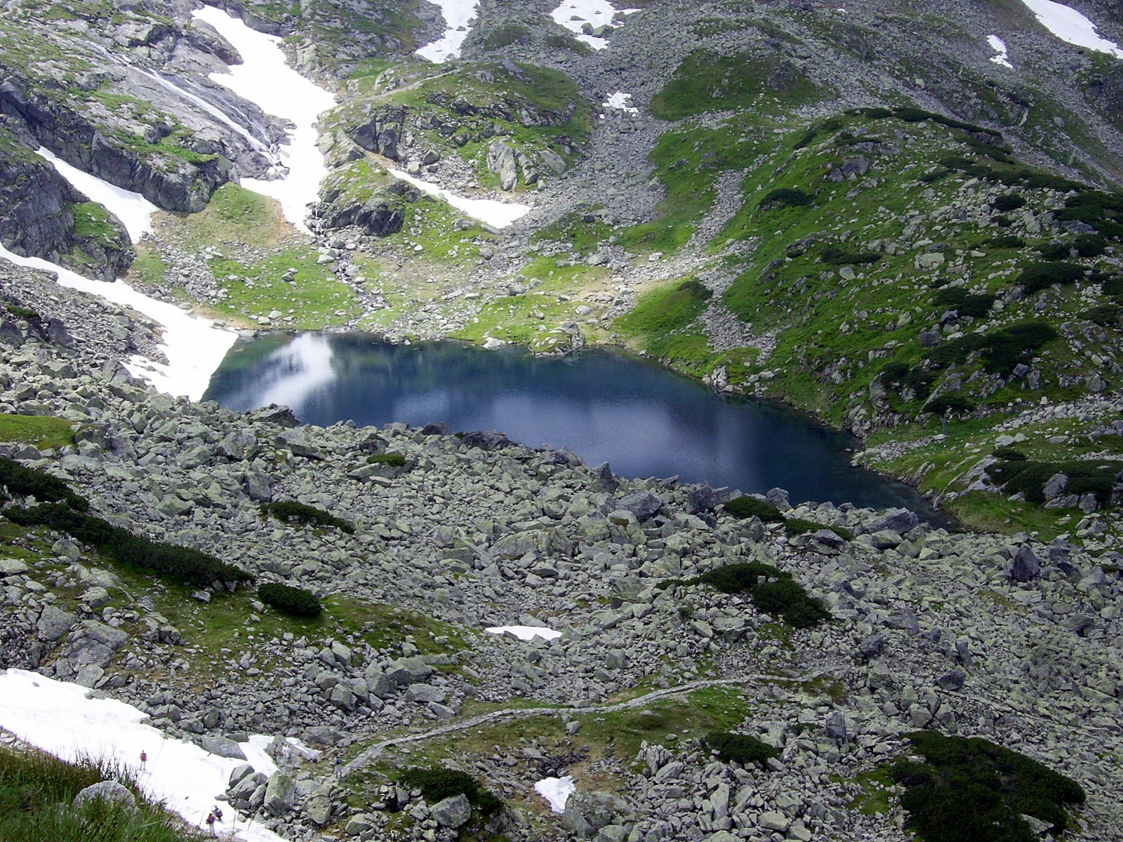 Długi Staw Gąsienicowy ze szlaku na Kościelec